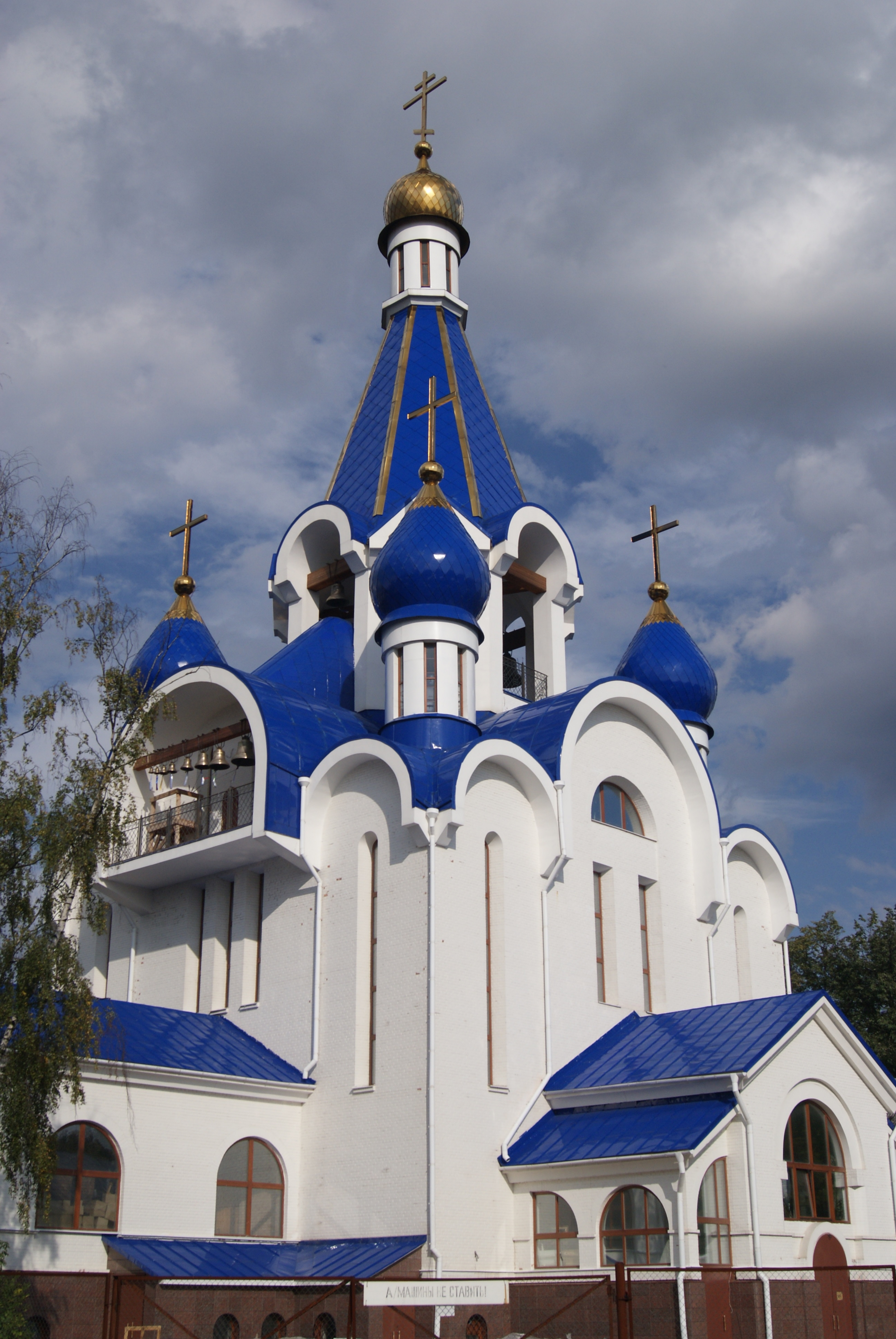 Храм пресвятой богородицы в Костино, г. Королев.